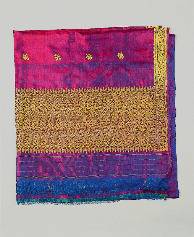 Σάρι μεταξωτό, υφαντό Ινδία. Δεκαετία 1970 2003.6.154 / Συλλογή Πελοποννησιακού Λαογραφικού Ιδρύματος